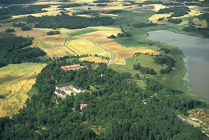 Löfstads slott i bildens nedre del. Motiv: Löfstad Nyckelord: Byggnadsminnen, Flygbilder, Riksintressen Kategori: Herrgårds-/slottslandskapLöfstads slott i bildens nedre del.